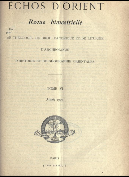 Échos d'Orient Tome VI, Année 1904